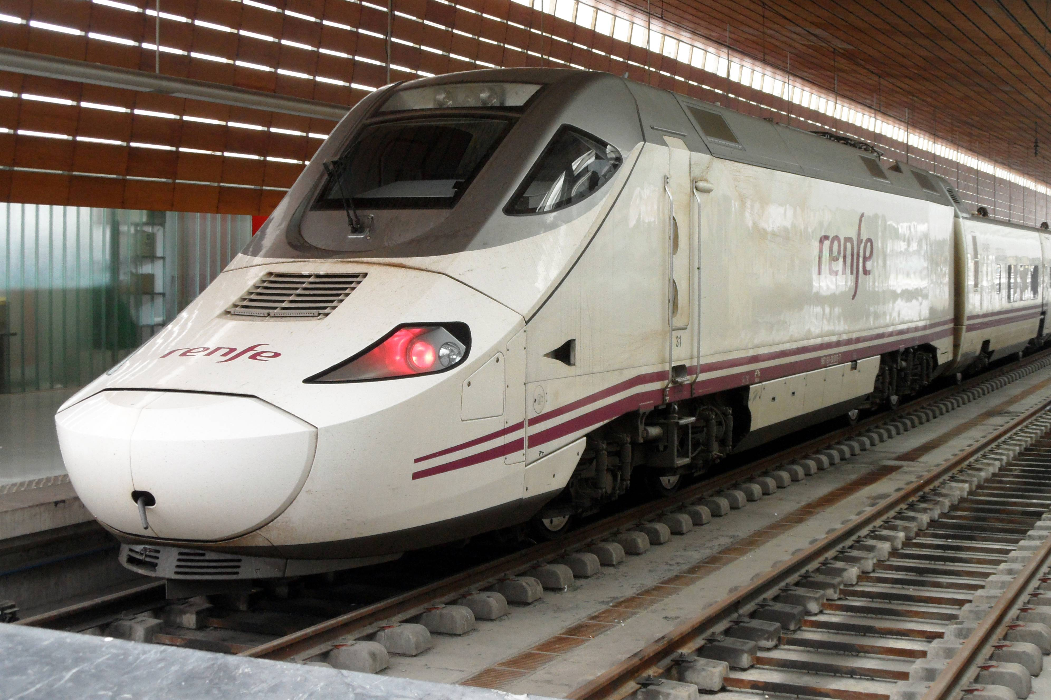 Renfe-Baureihe 130, umspurbarer Triebkopf, gekuppelt mit angepasstem Talgo-7-Wagenzug. Alle Fahrzeuge sind umspurbar, der Kastenquerschnitt von Lok und Wagenzug ist auffällig abweichend, die Ursache ist die sowohl räumlich als auch zeitlich völlig getrennte Entwicklung der Triebfahrzeuge und Wagen. Während die Wagen als Talgo 7 die nächste Entwicklungssstufe des Talgo Pendular sind, für einen klassischen Betrieb mit wechselnden Lokomotiven entworfen und gebaut wurden und schon 2001 im Regelbetrieb verkehrten, sind die Maschinen vom erst 2005 gebauten Prototyp Talgo Travca abgeleitet worden. Eingefahren von Madrid